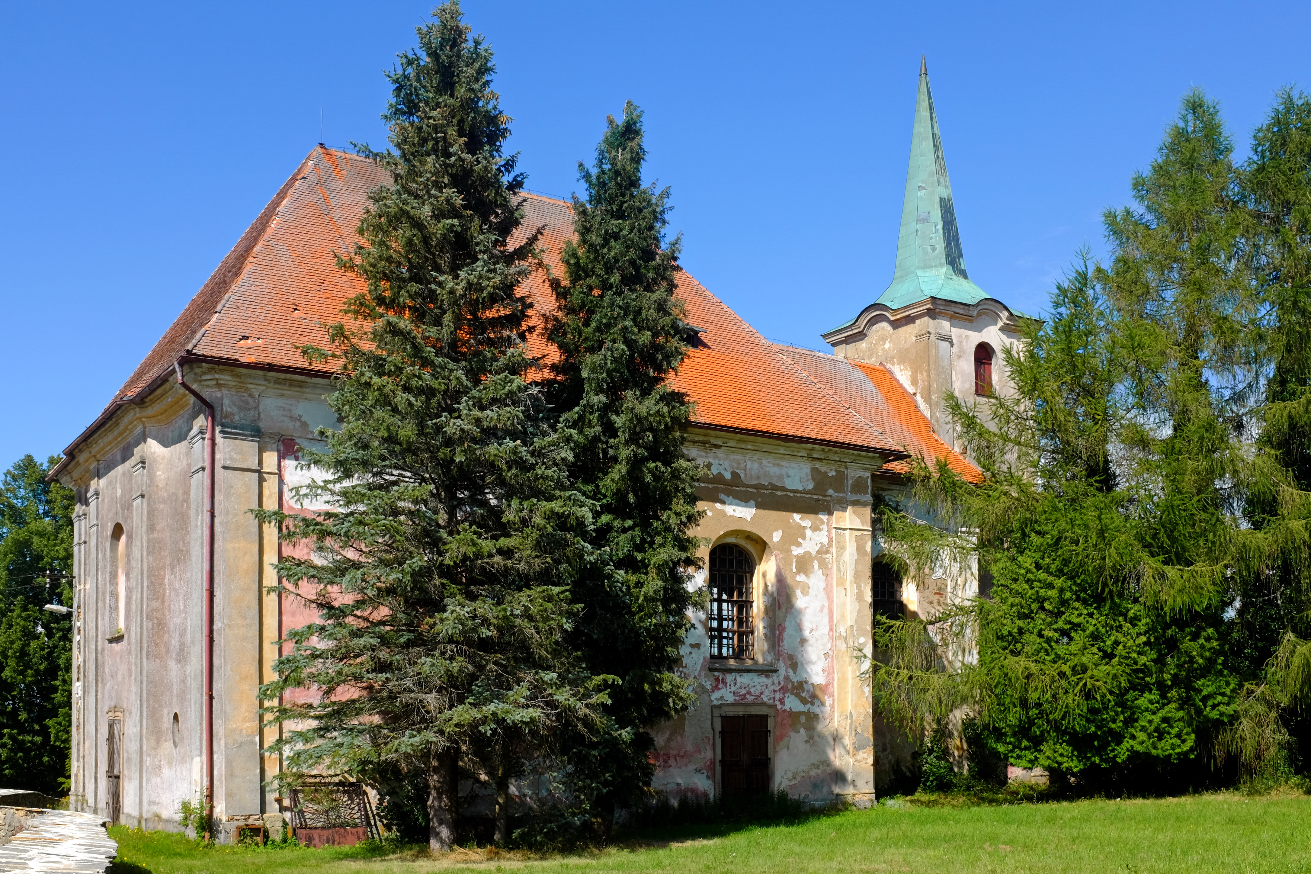 Kostel svatého Vavřince, Ovesné Kladruby.